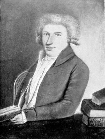 Hendricus Antonius Bauer op een lichtdruk naar pastel van H.A. Baur, 1788. Uit: Verslag Museum Boijmans 1910